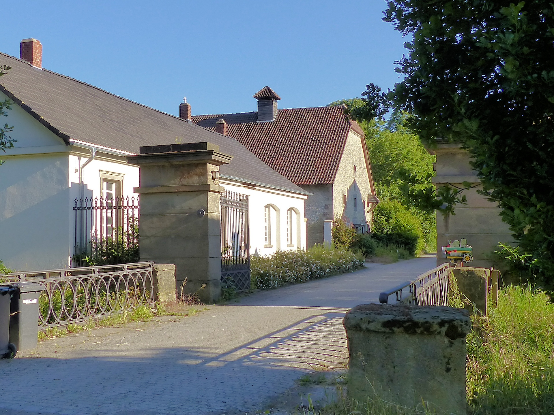 Eingangstor zum Rittergut Hedwigsburg, vorn die Brücke über den Großen Graben